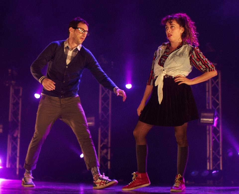 הופעה של אנסמבל ציפורלה